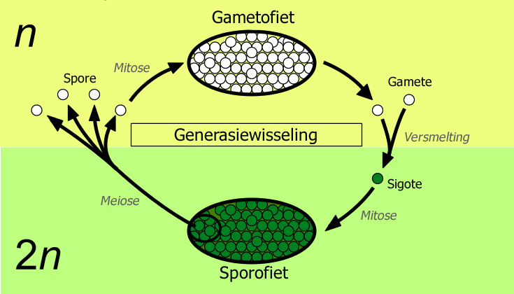 Generasiewisseling